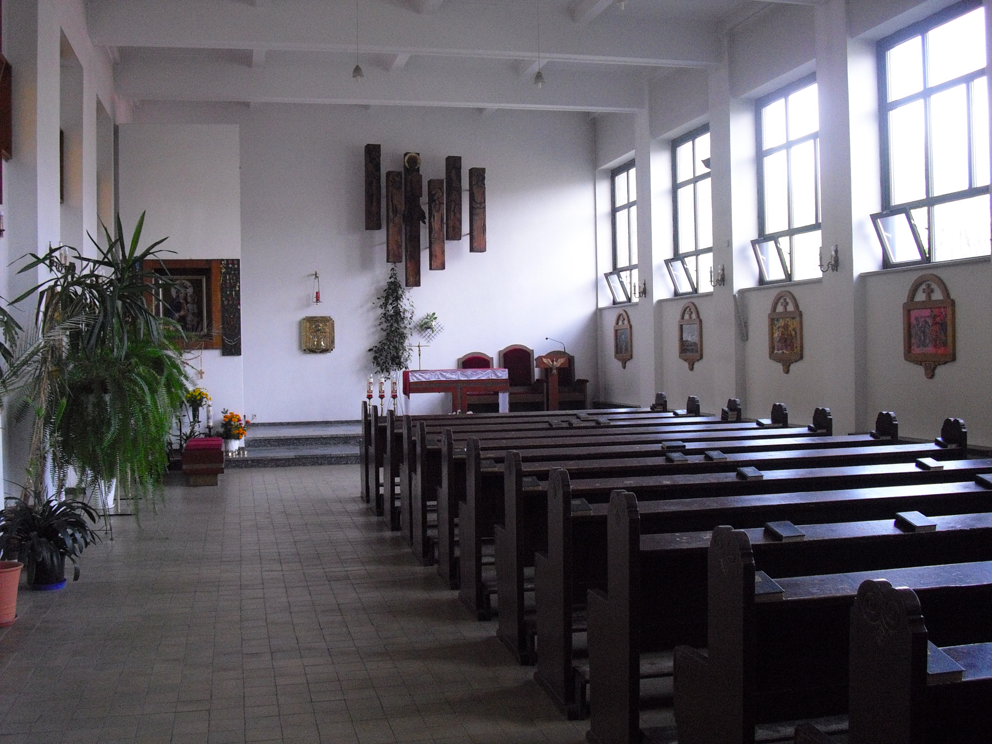 Kościół Parafii Najświętszego Serca Pana Jezusa i św. Jana Bosko w Piotrowicach, boczna nawa, drewniane ławy pochodzą z przedwojennego kościoła